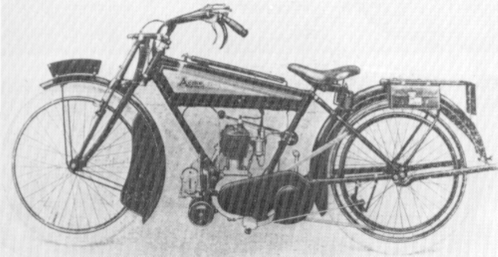 Afbeelding is meer dan zeventig jaar oud, uit catalogus 1922